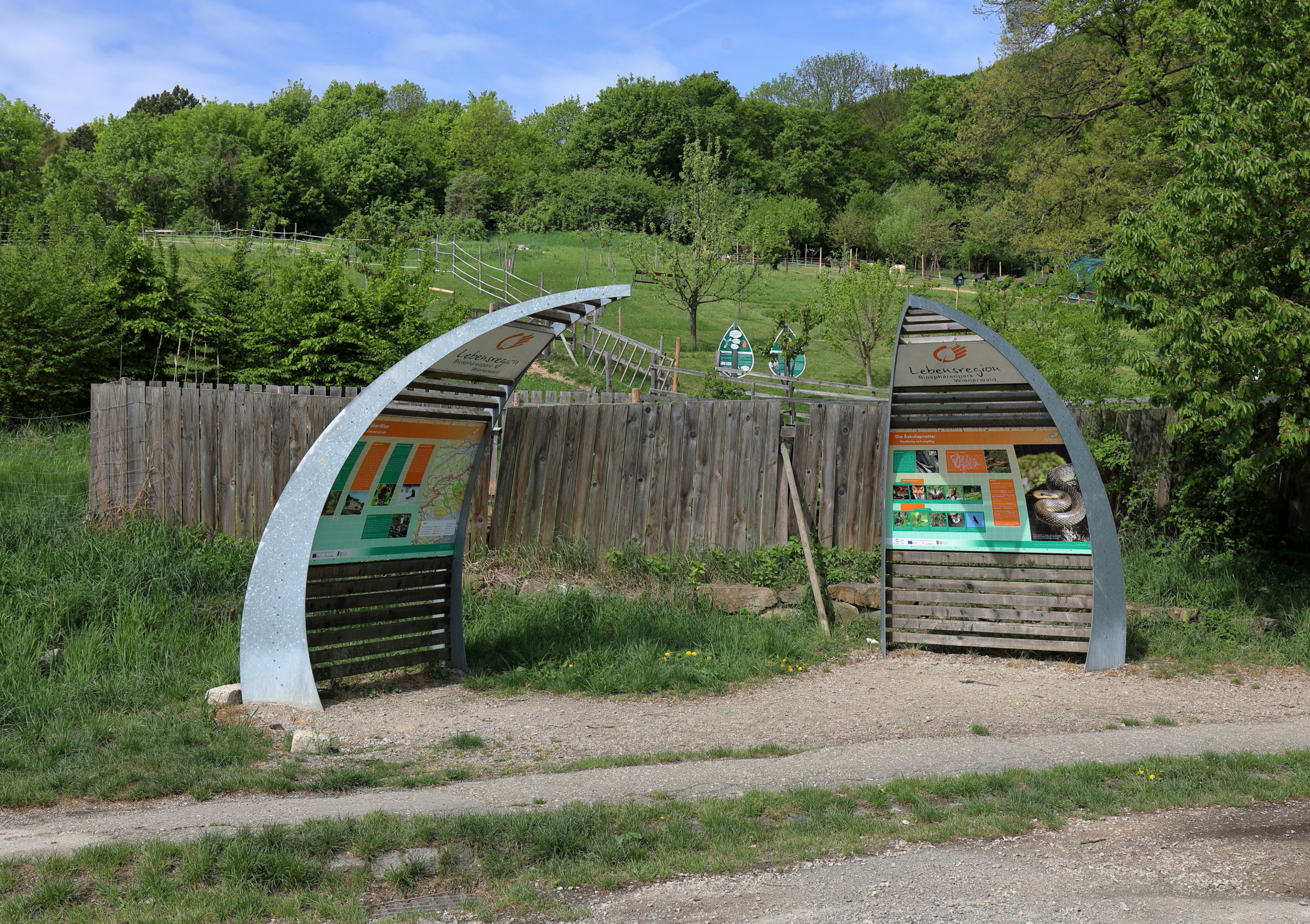 Infopoint bezüglich Biosphärenpark Wienerwald am südöstlichen Abhang des Latisberges bzw. am Reisenberg, umgangssprachlich Am Cobenzl bezeichnet, im 19. Wiener Gemeindebezirk Döbling und dahinter Teile des „Landgut Wien Cobenzl“.